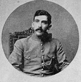 El general Maclovio Herrera